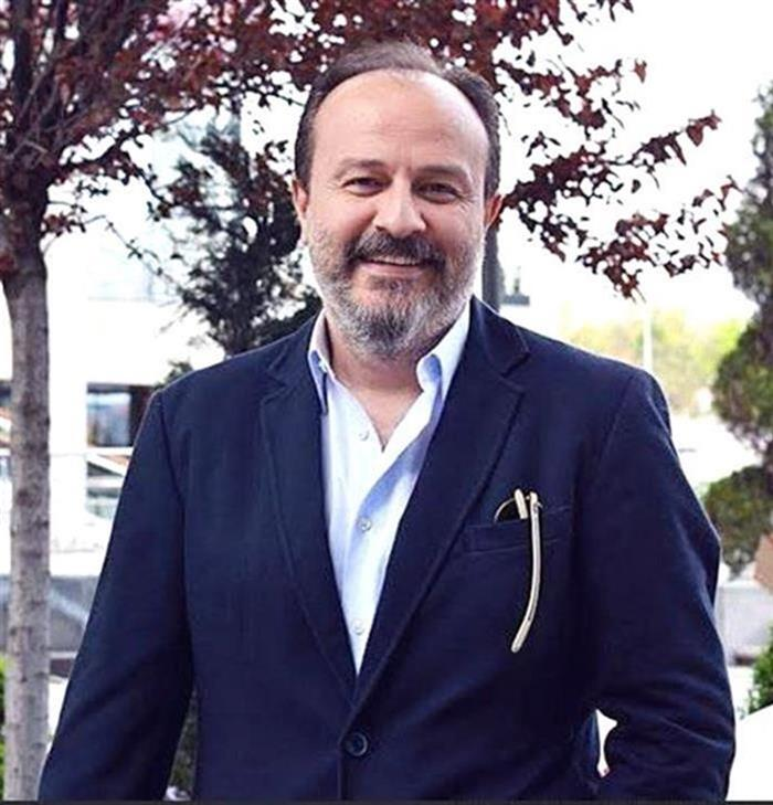 Ünsal Ünlü